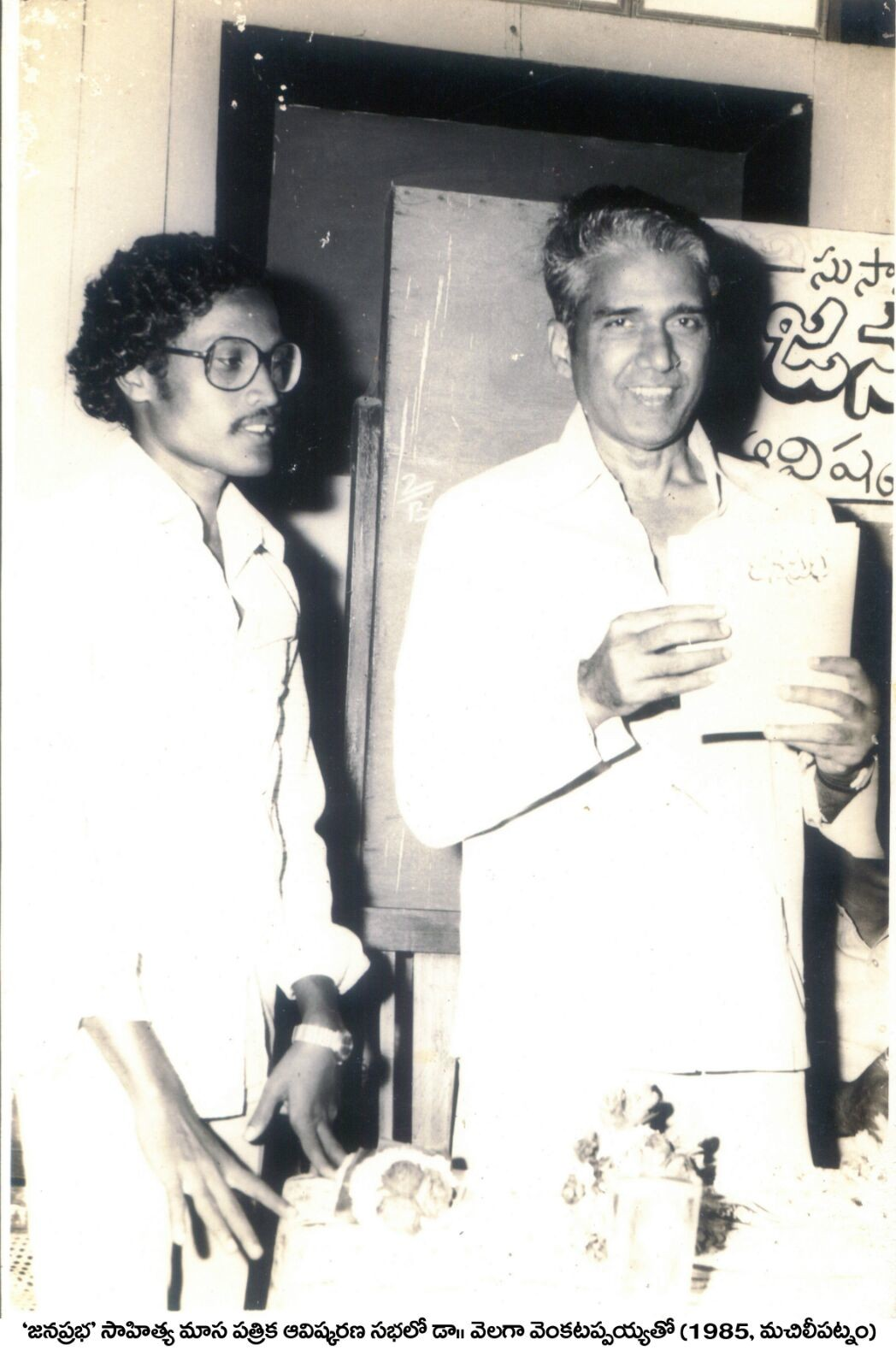 జనప్రభ సాహిత్య మాసపత్రిక ఆవిష్కరణ సభలో, వెలగా వెంకటప్పయ్య గారితో (1985 - మచిలీపట్నం)